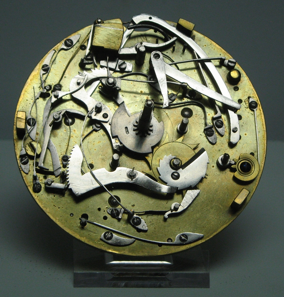 Kutschenuhr mit Repetitionsschlagwerk, Friedberg, Heimatmuseum